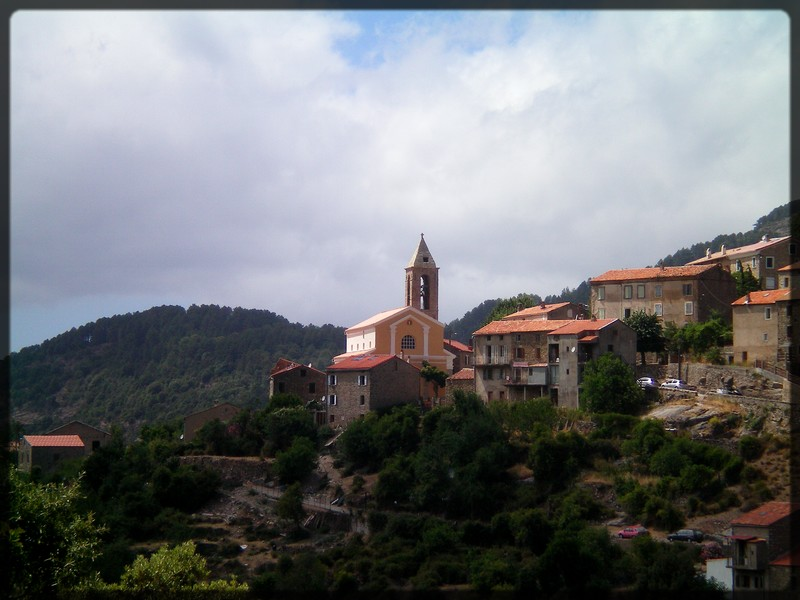 Vue sur le petit village de Cristinacce en Corse-du-Sud